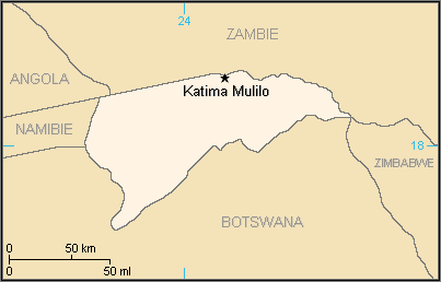 Description:Carte du Caprivi Oriental / Lozi Auteur:Rémih